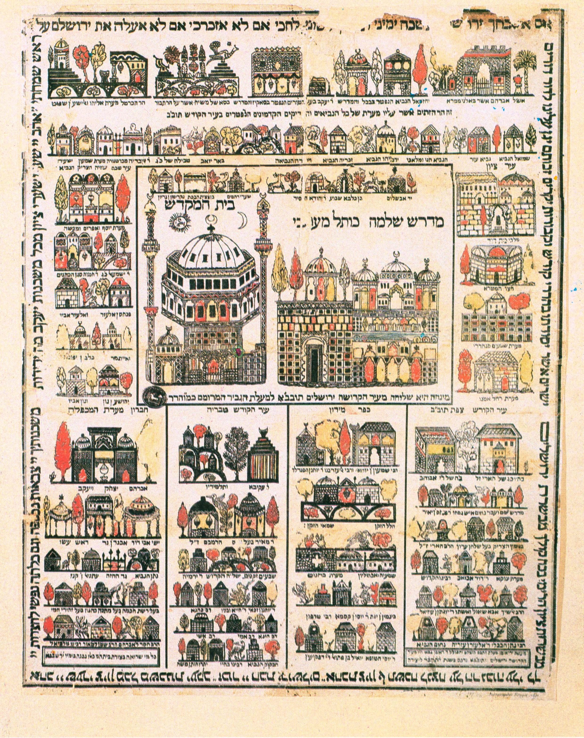 אם אשכחך ירושלים" פיתוח עץ מאת חיים זאב אשכנזי"